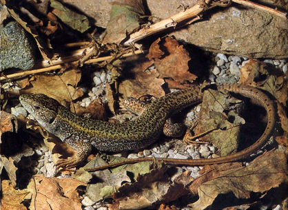 Jaszczurka trójpręga